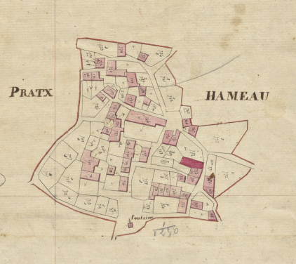 Prats de Balaguer en el Cadastre napoleònic del 1812 (Arxius Departamentals dels Pirineus Orientals)